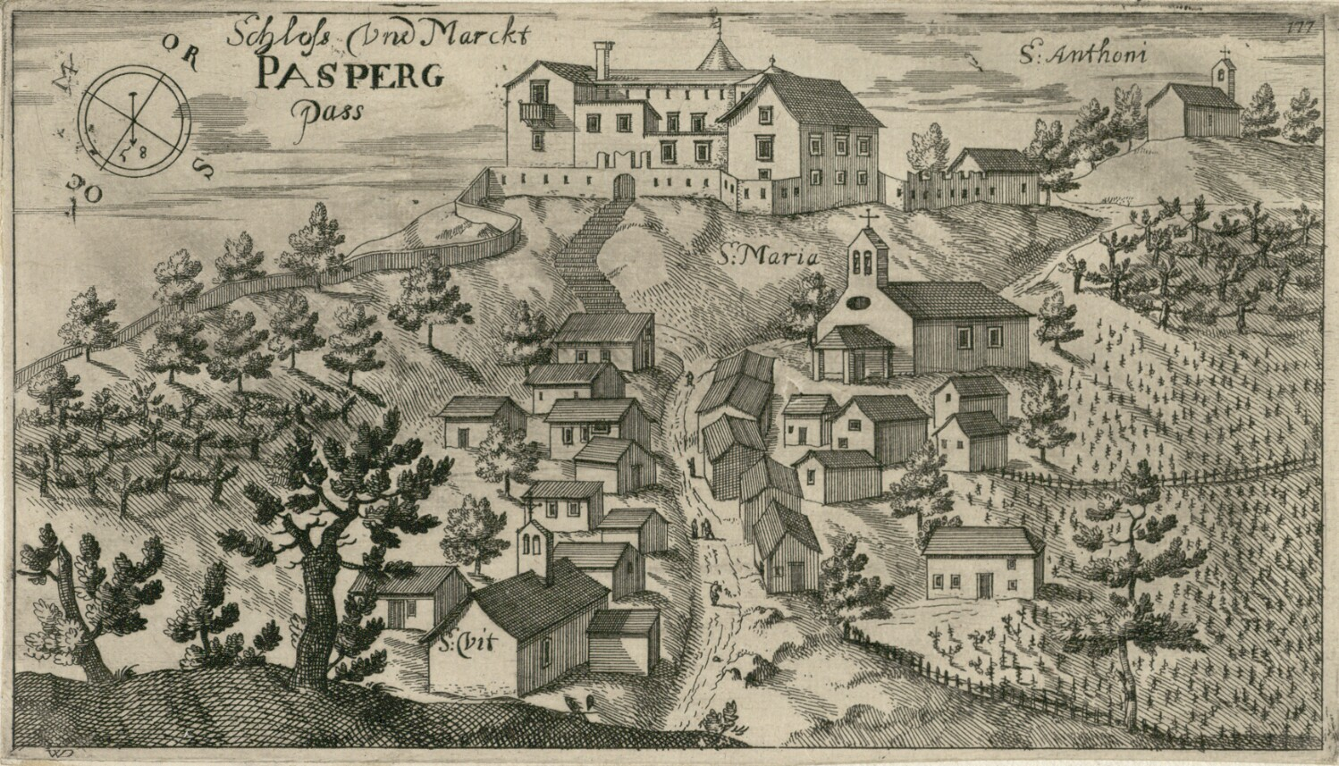 Paz